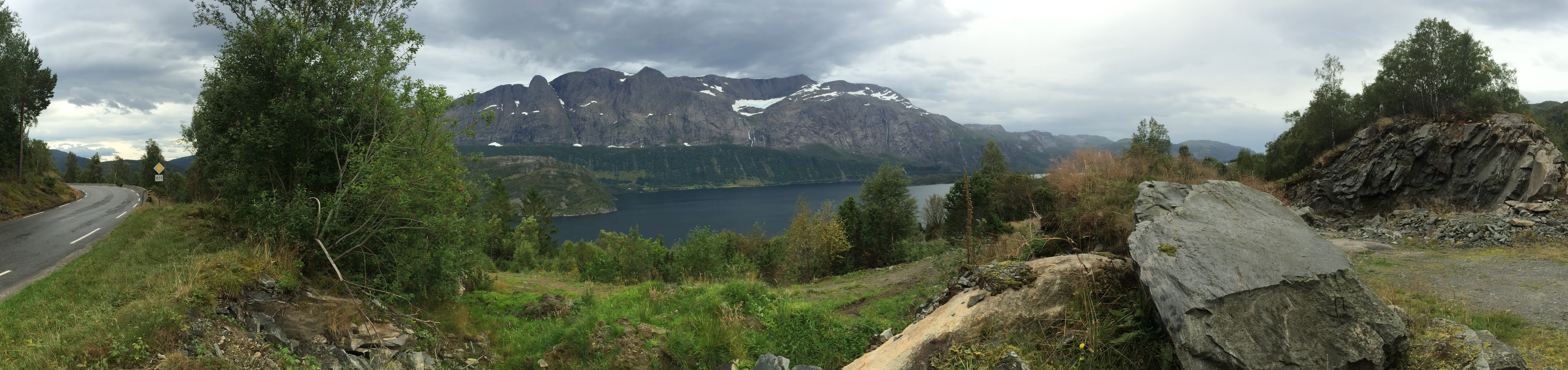 Riksvei 611 langs Førdefjorden med utstyn mot Toreheia (?) i sør. 14. september 2015. Beskåret, fortegnet panorama.